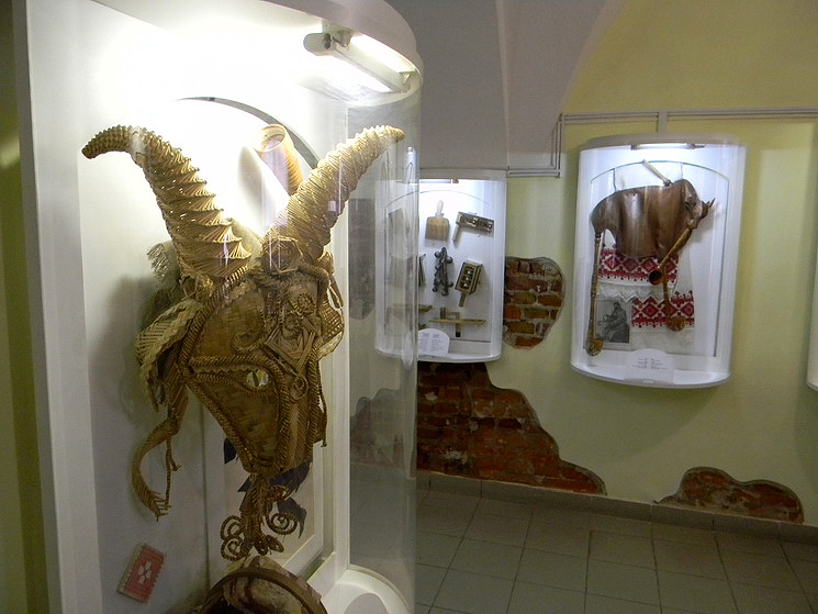 Музычны музей. Мінск